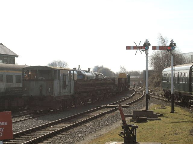 Dereham Diesel freight